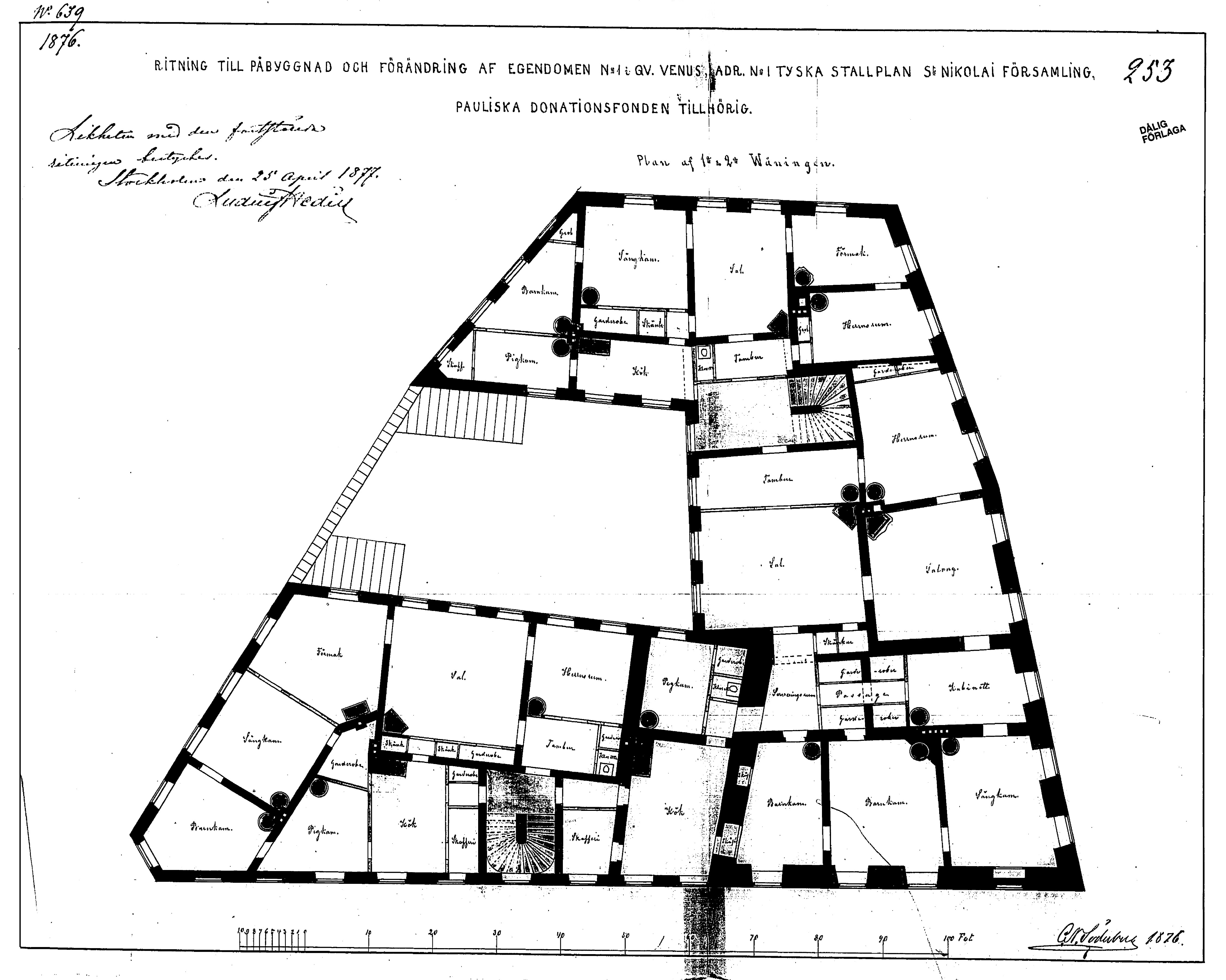 Om- och påbyggnad av fastigheten Venus 1 i Gamla stan